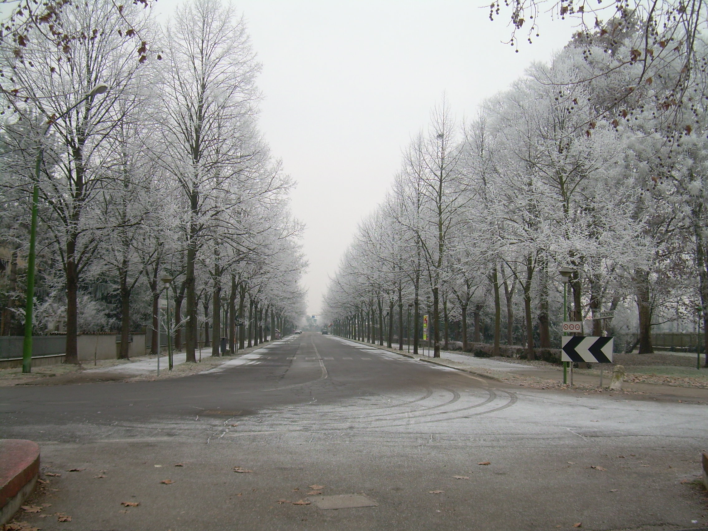 Portomaggiore, provincia di Ferrara,: viale Cesare Battisti